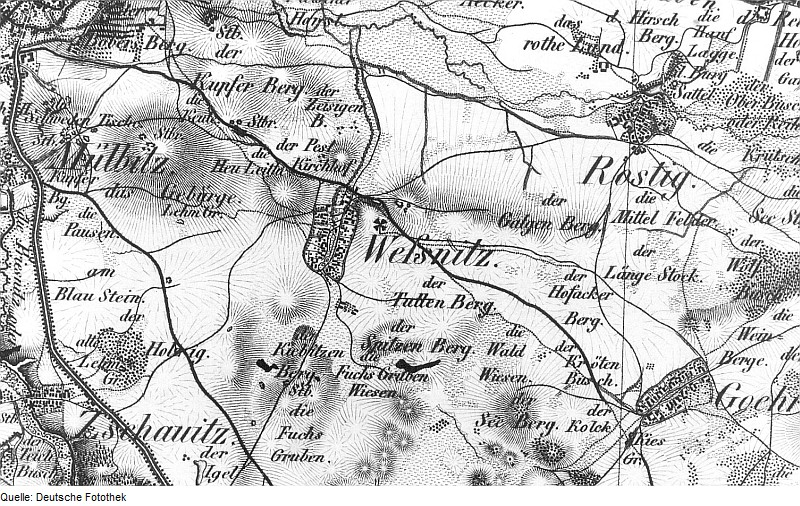 Original image description from the Deutsche Fotothek Großenhain-Weßnitz. Oberreit, Sect. Großenhain, 1841/43